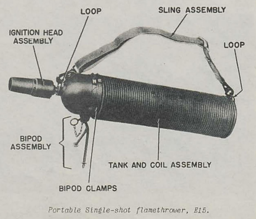 Prototype américain de lance-flammes à un seul coup, selon le même principe que le plus connu Einstossflammenwerfer 46 allemand.